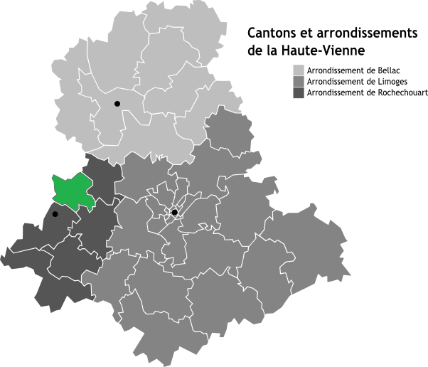 Canton de Saint-Junien-Ouest, Limousin, France en Carte des arrondissements de la Haute-Vienne